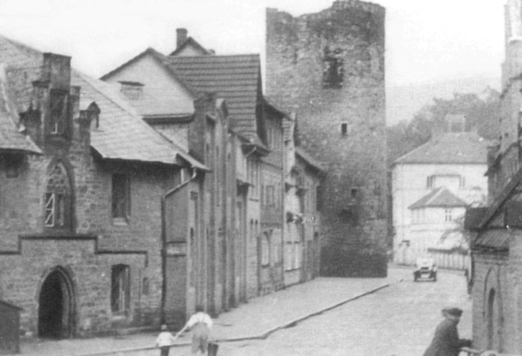 Ziegelpfortenturm in Münden